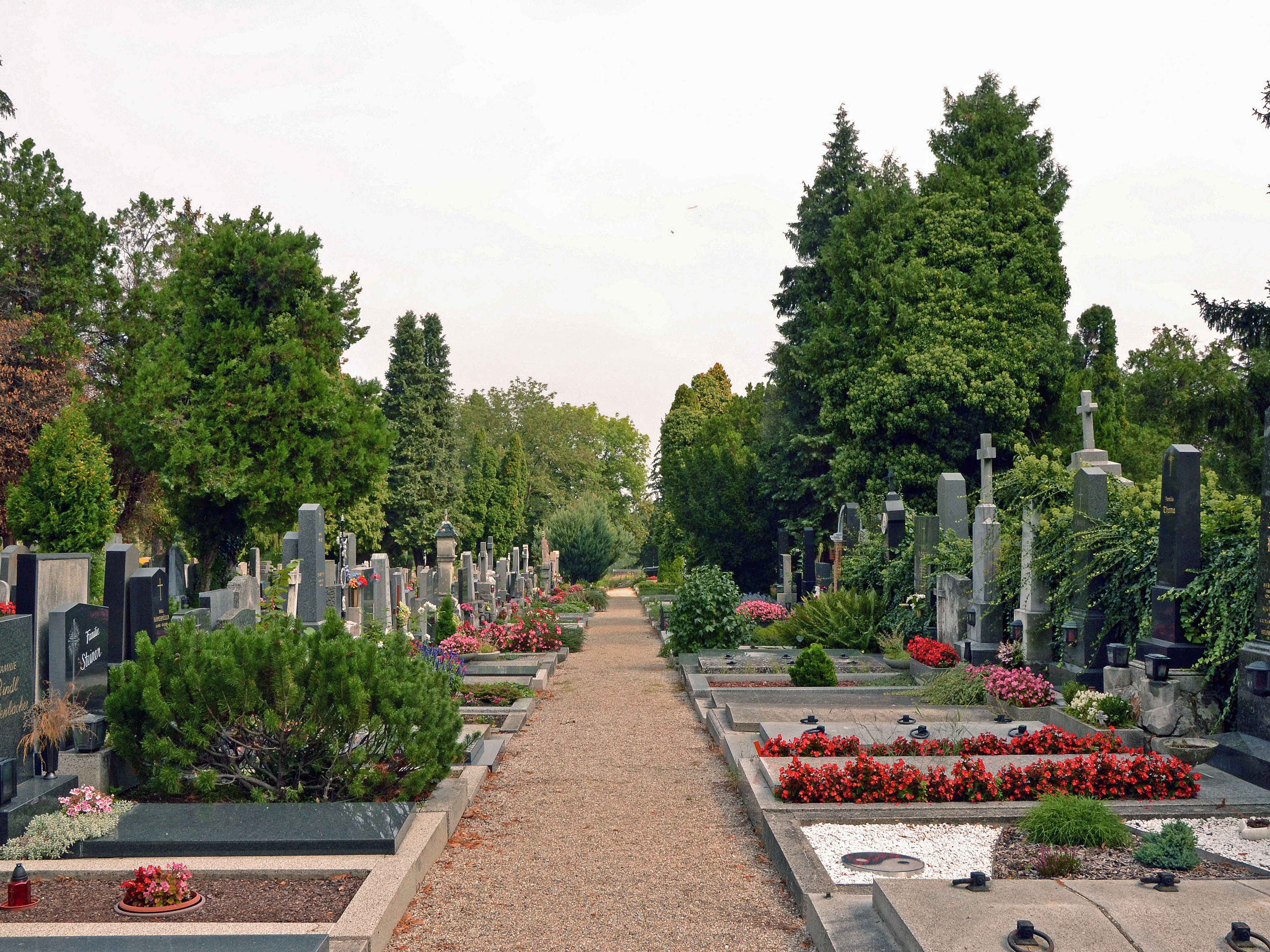 Klosterneuburg Oberer Stadtfriedhof